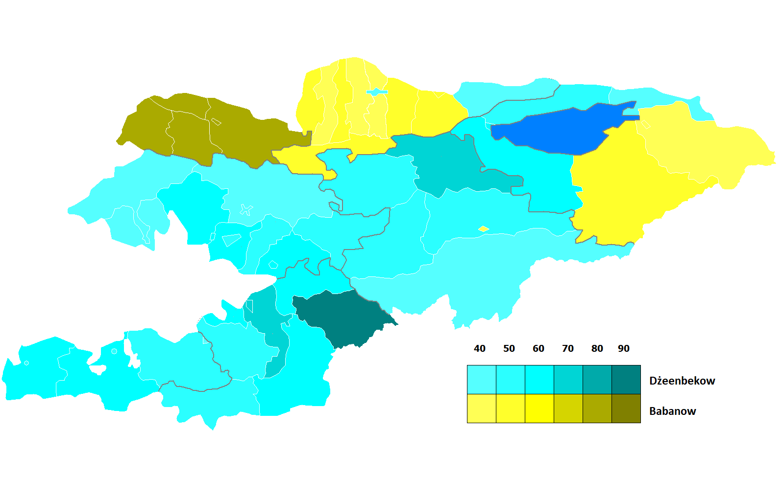 Mapa obrazująca rozkład głosów dla dwóch głównych kandydatów